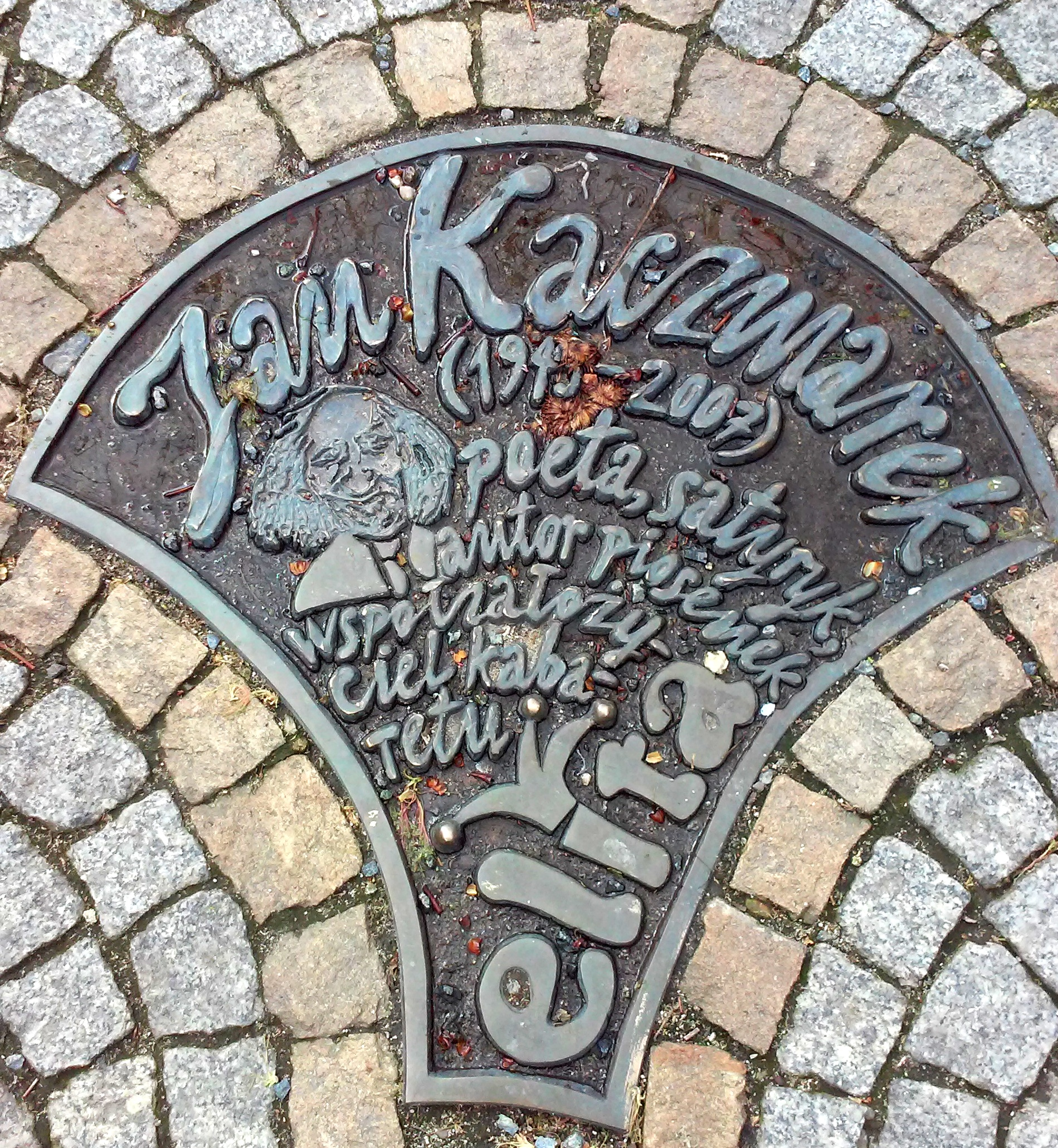 Legnica, Aleja Gwiazd Satyrykonu, tablica pamiątkowa - Jan Kaczmarek.